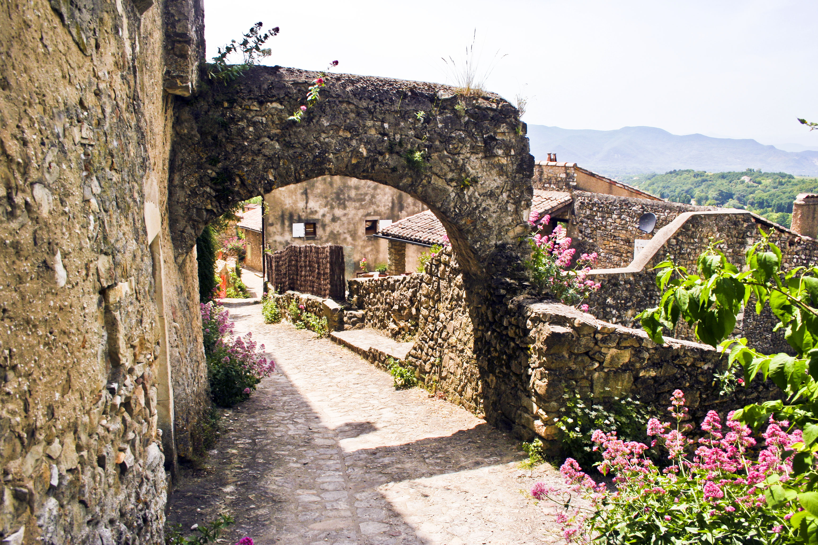 Rue, haut du village de Mirmande (Drôme), France